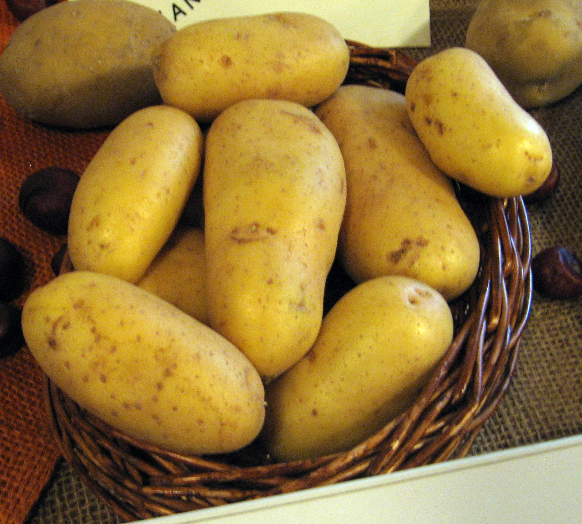 odrůda Filea